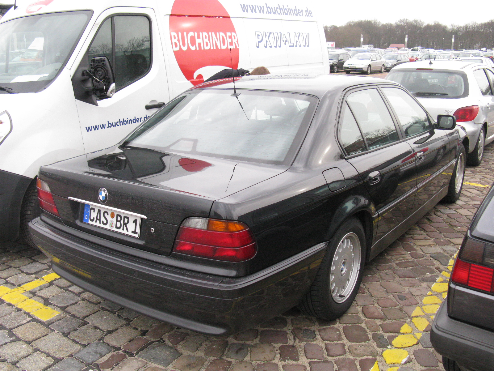 BMW 7 Series E38